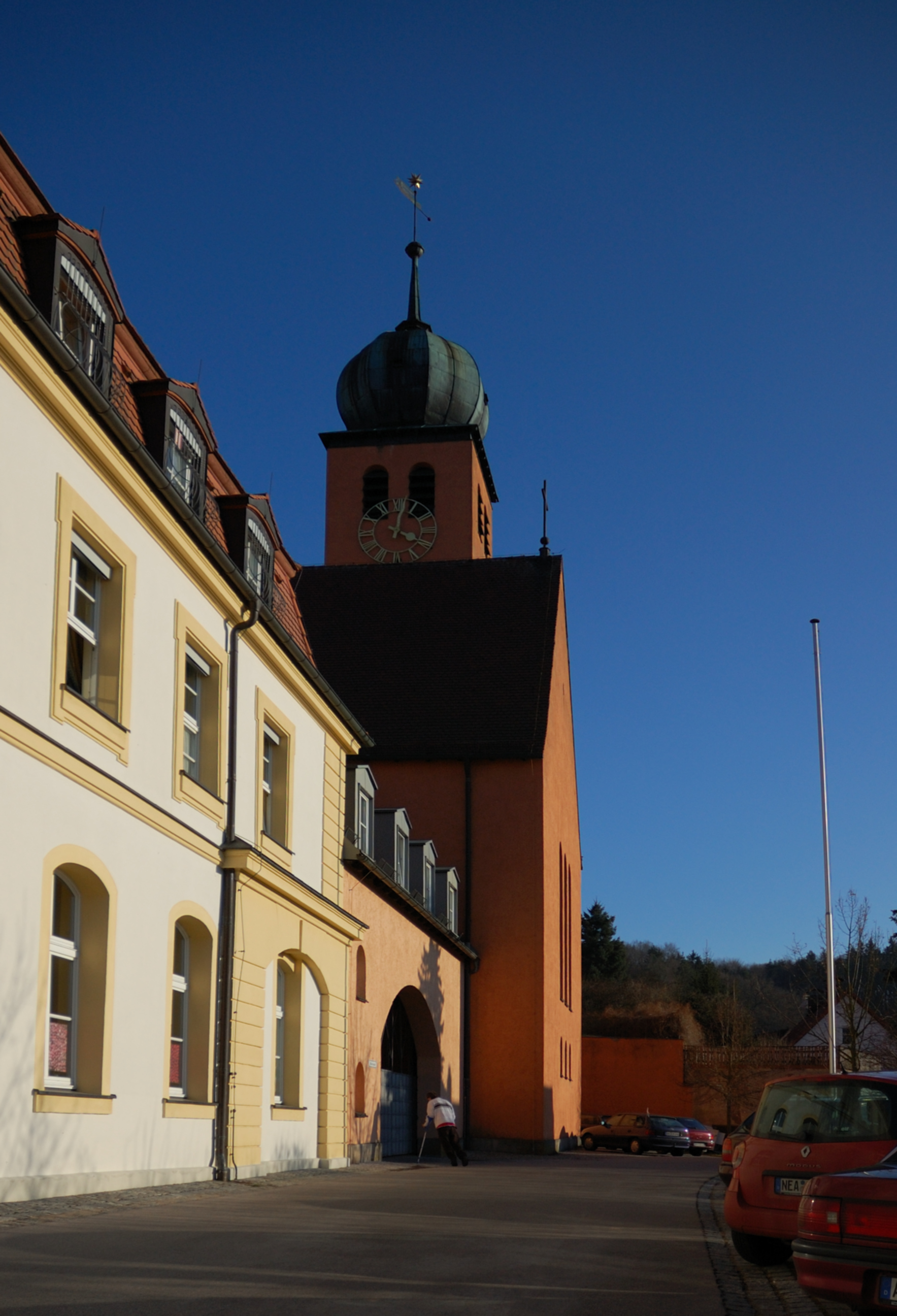 St. Martin Bruckberg (ev.-luth)